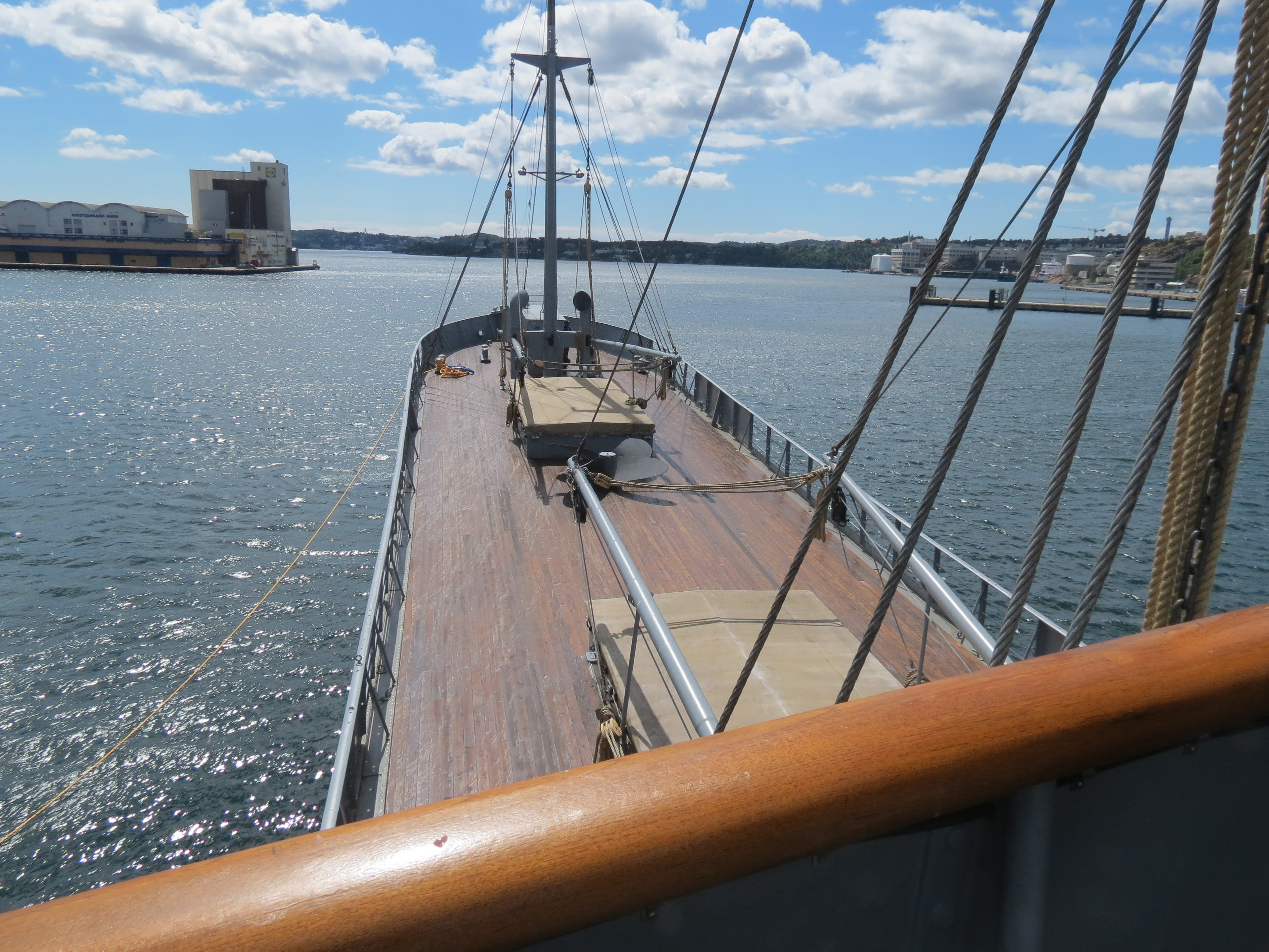 Veteran-, museumsskip / krigsminnesmerke